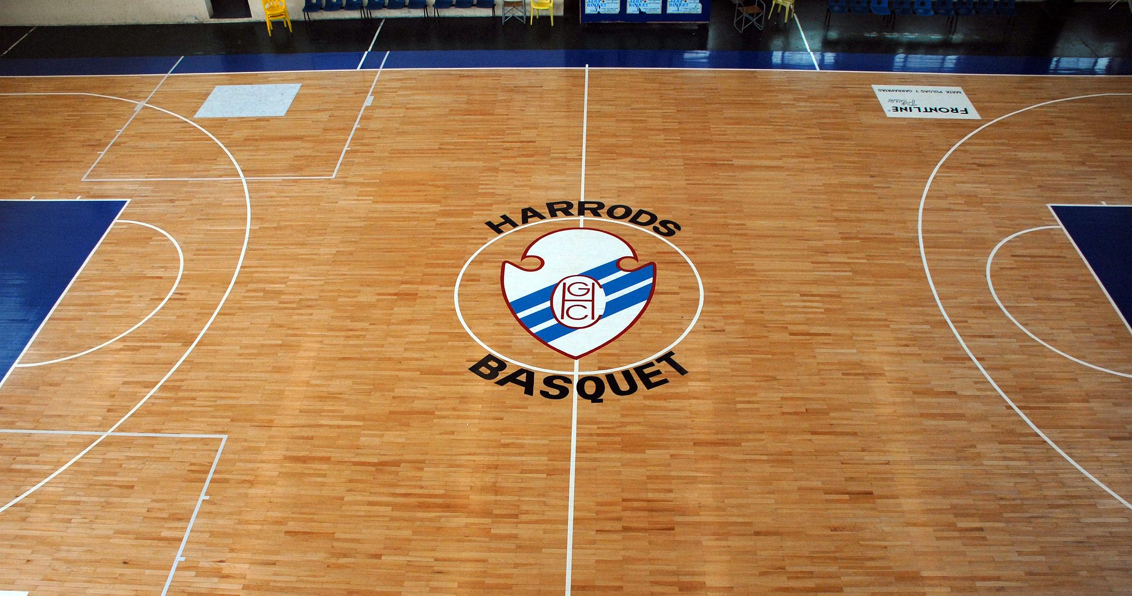 Basquet 1